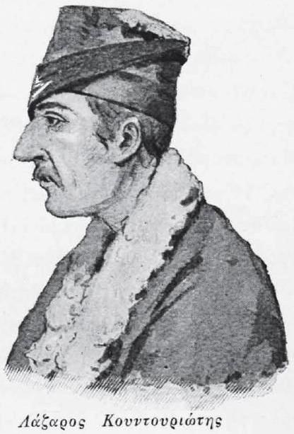 griechischer Freiheitskämpfer, 1821